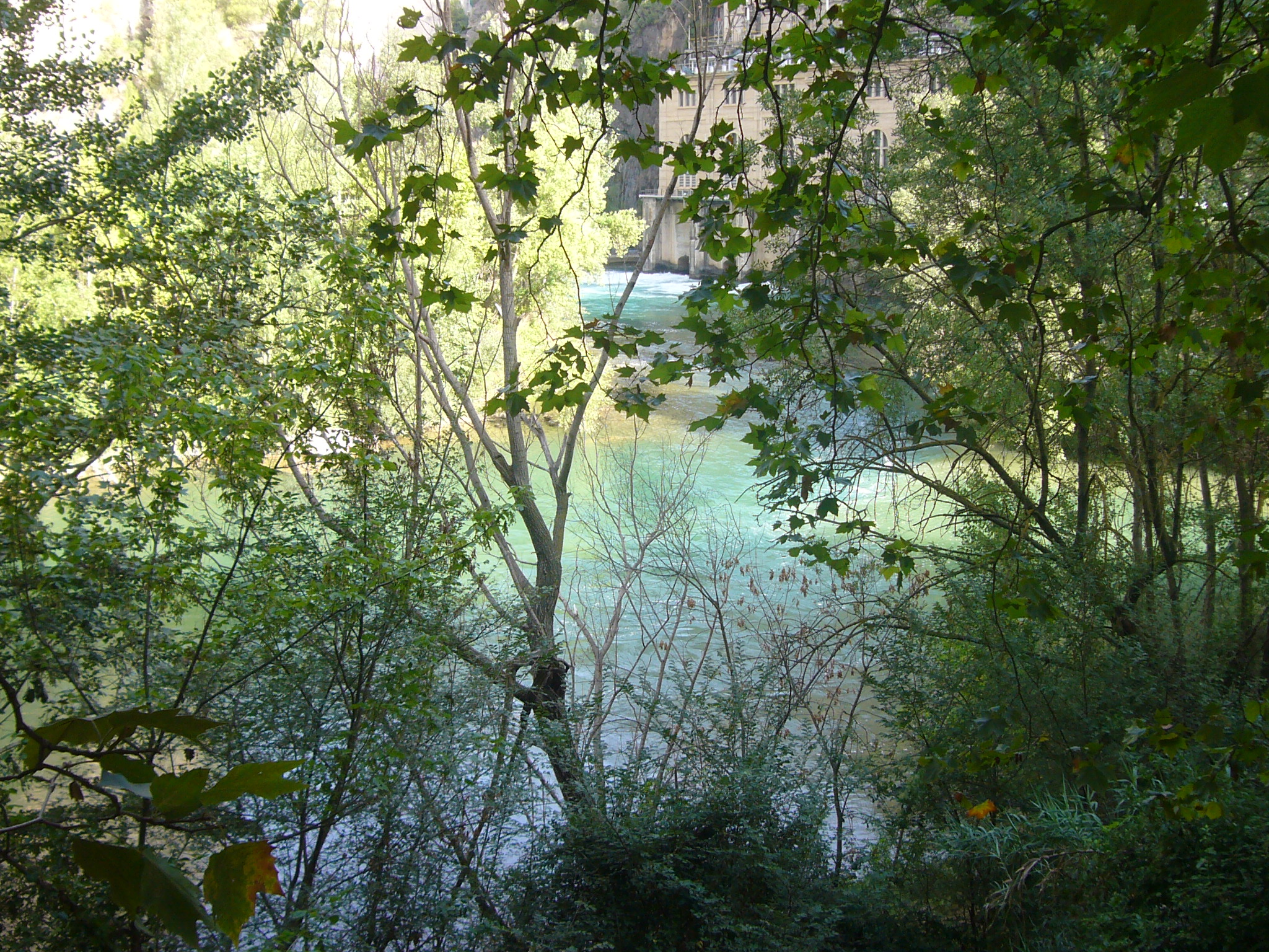 Aiguabarreig del riu Segre i el Noguera Pallaresa